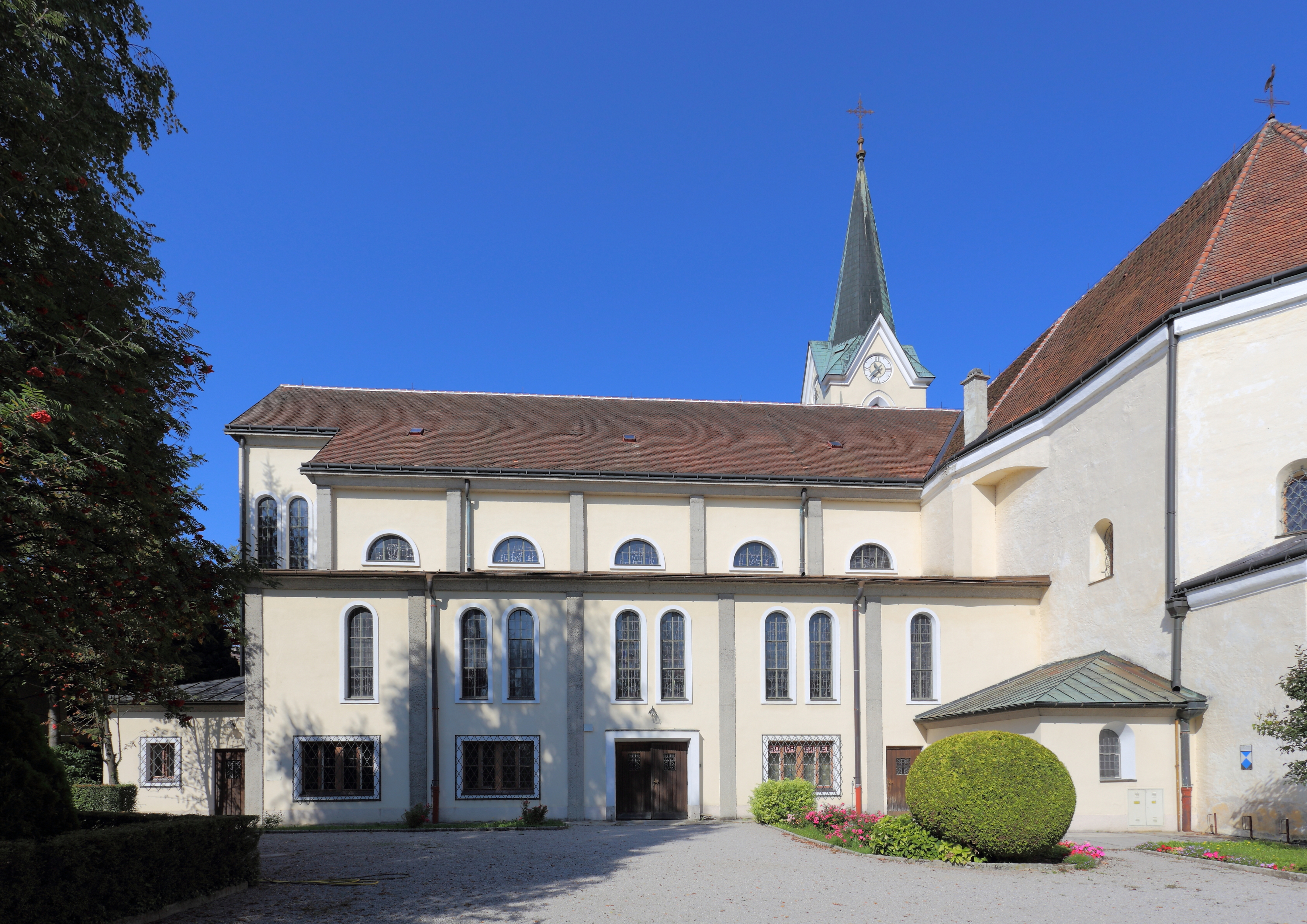 Ostansicht der (neuen) Pfarrkirche der niederösterreichischen Stadt Wieselburg. Der Zubau beziehungsweise die neue Kirche wurde nach den Plänen des St. Pöltener Architekten Franz Barnath von 1953 bis 1958 errichtet.